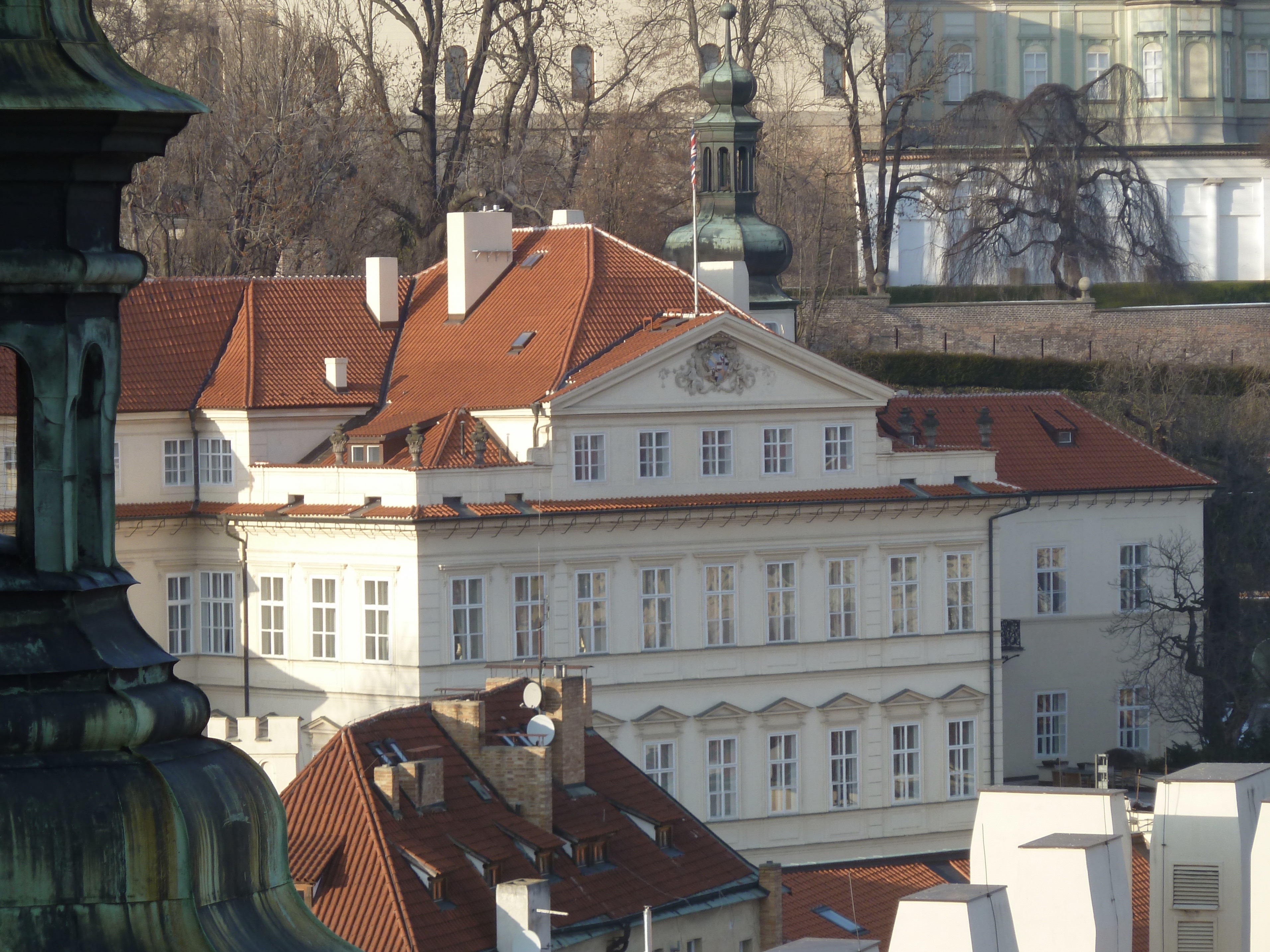 Thun Palace in Prague Lesser Town - British Embassy in Prague